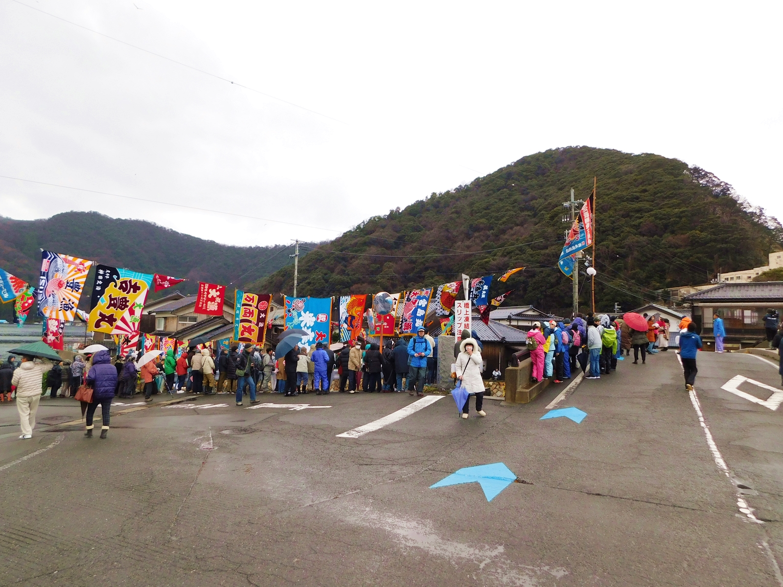 福井県美方郡美浜町日向の水中綱引き行事の場所、日向橋東詰